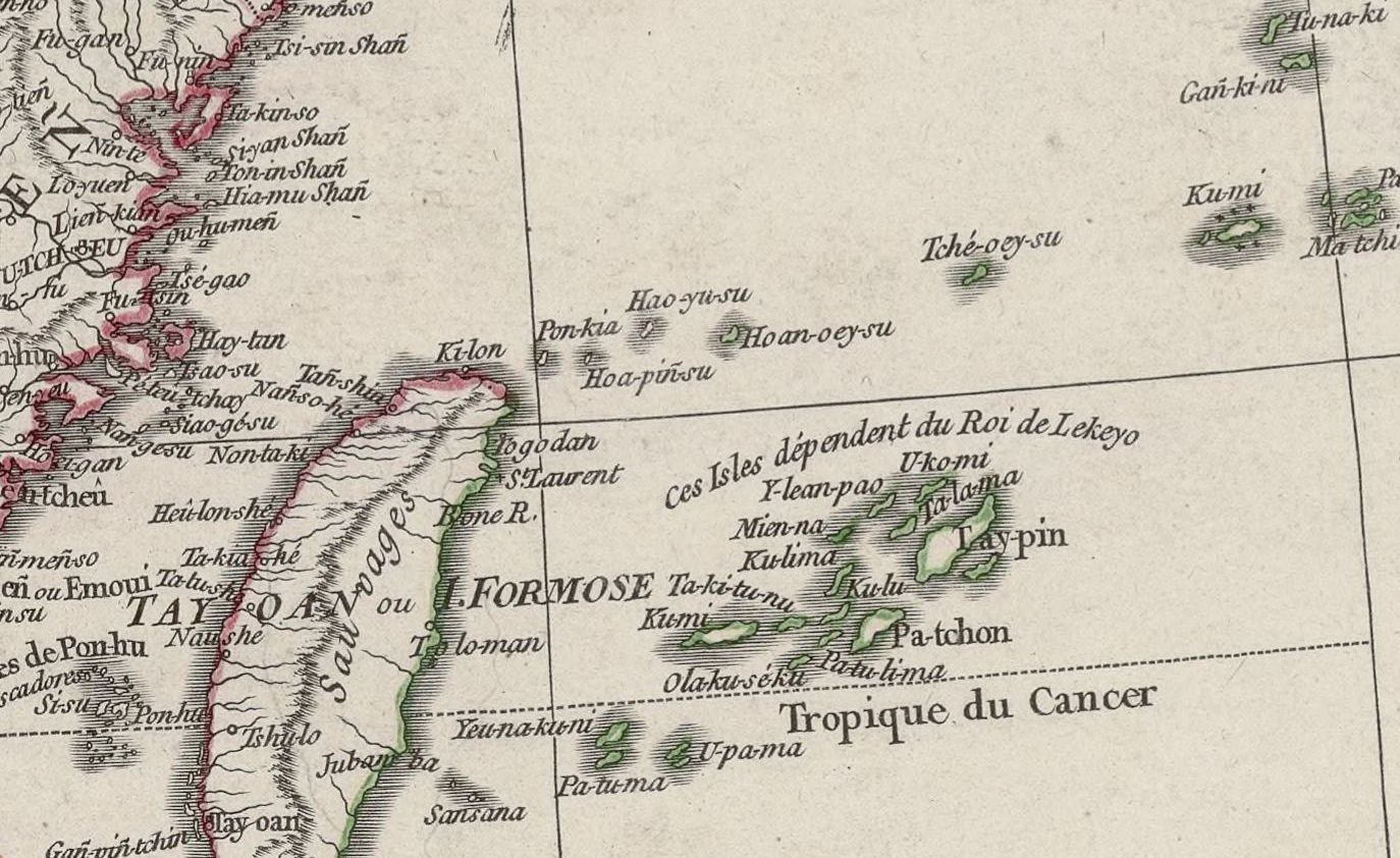 Seconde partie de la carte d'Asie contenant la Chine et partie de la Tartarie... : publiée sous les auspices de Mgr le Duc d'Orléans / par le Sr d'Anville ; Guillaume de La Haye sculp.